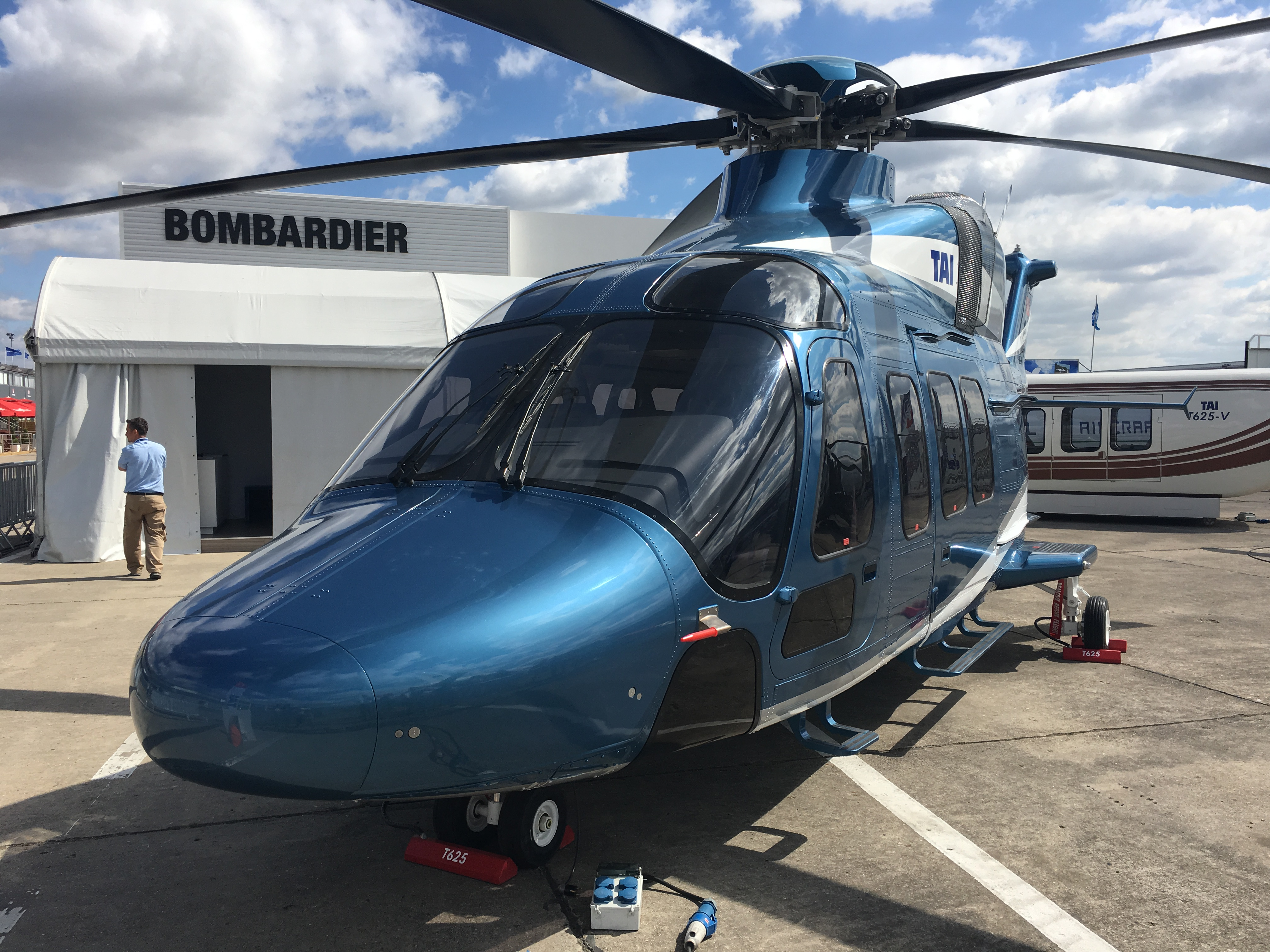 Paris Air Show'da sergilenen T-625